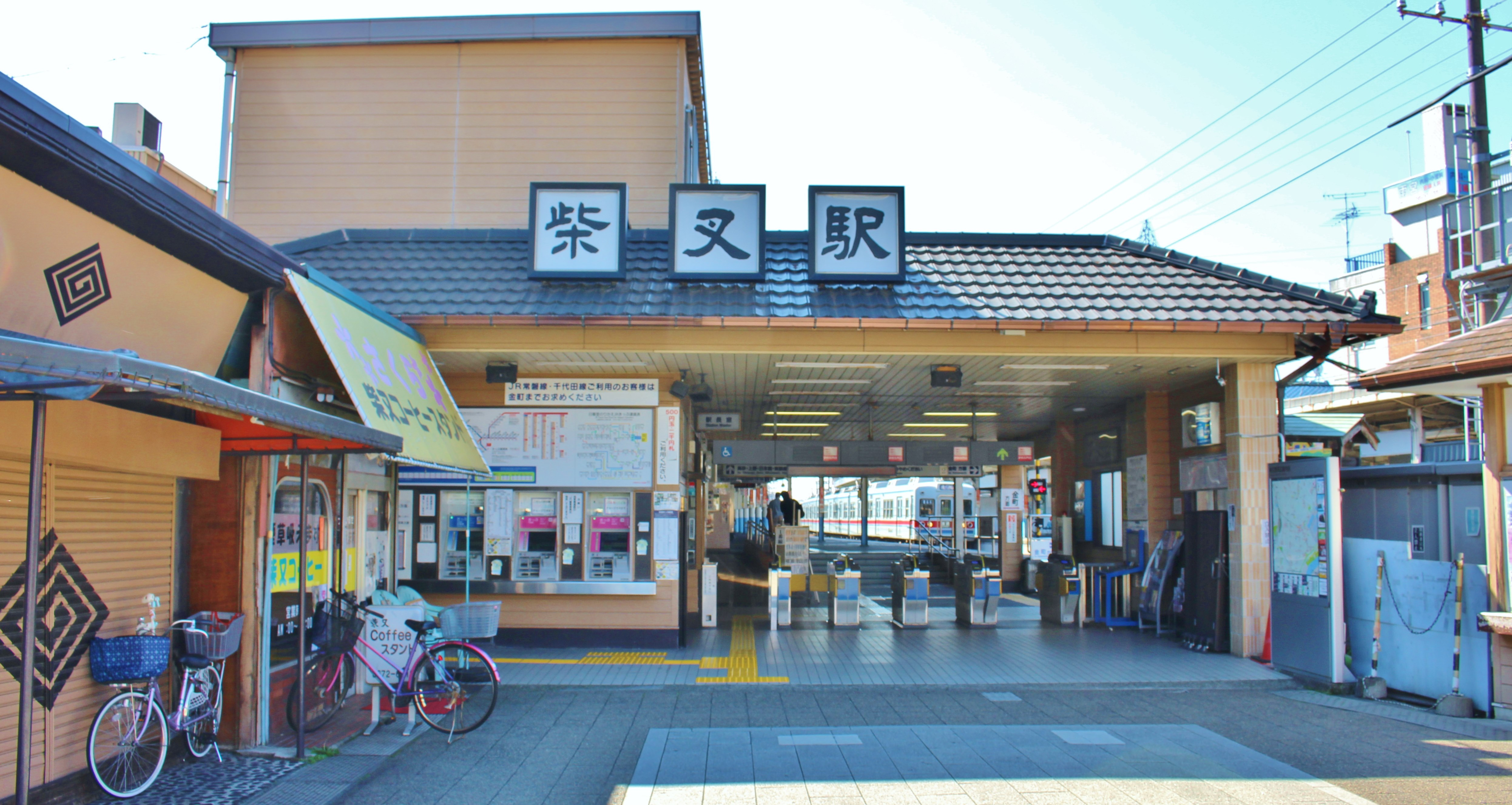 柴又駅